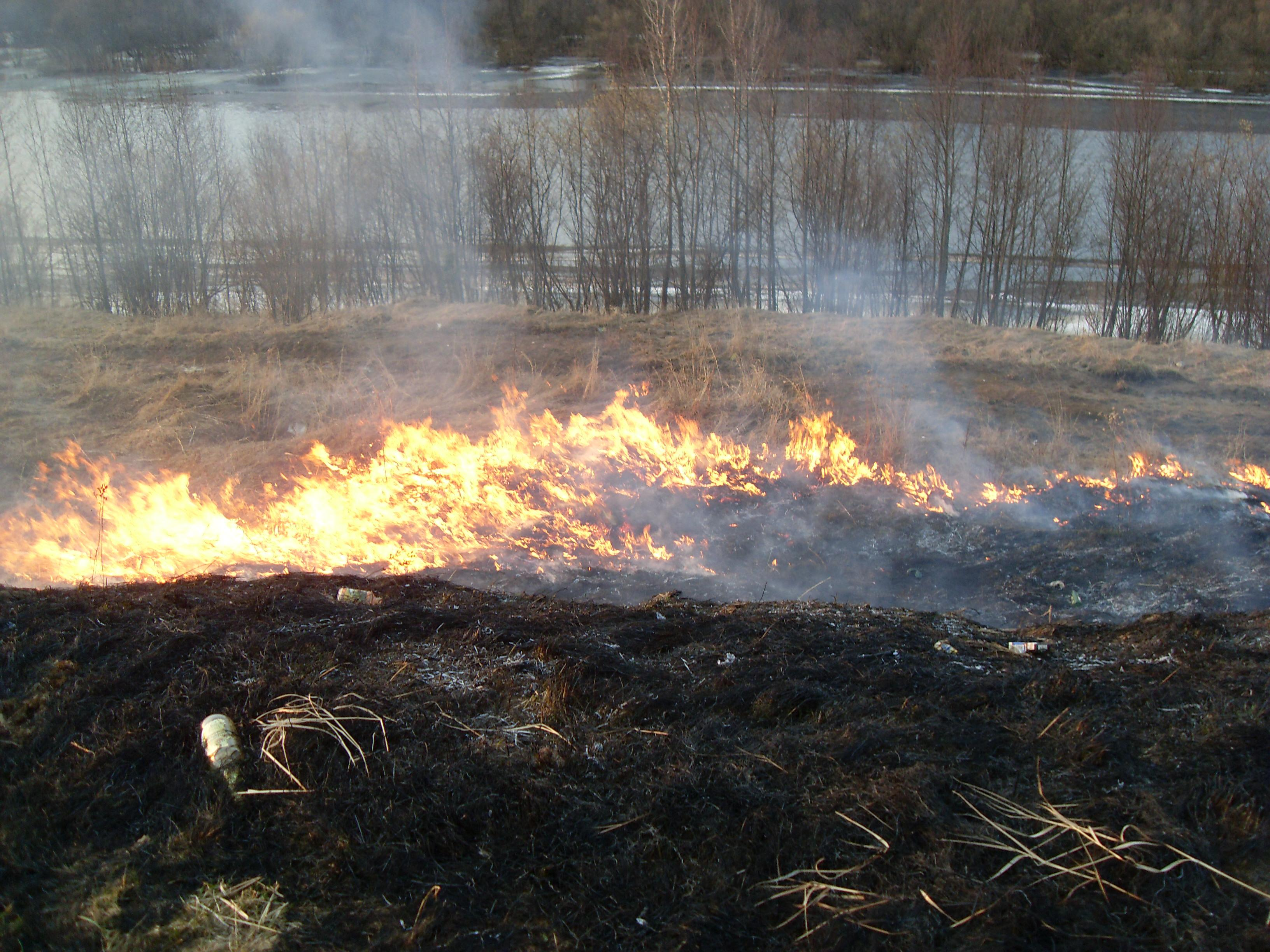 Горящая прошлогодняя трава на берегу реки